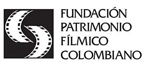 Logo de la Fundación Patrimonio Fílmico Colombiano